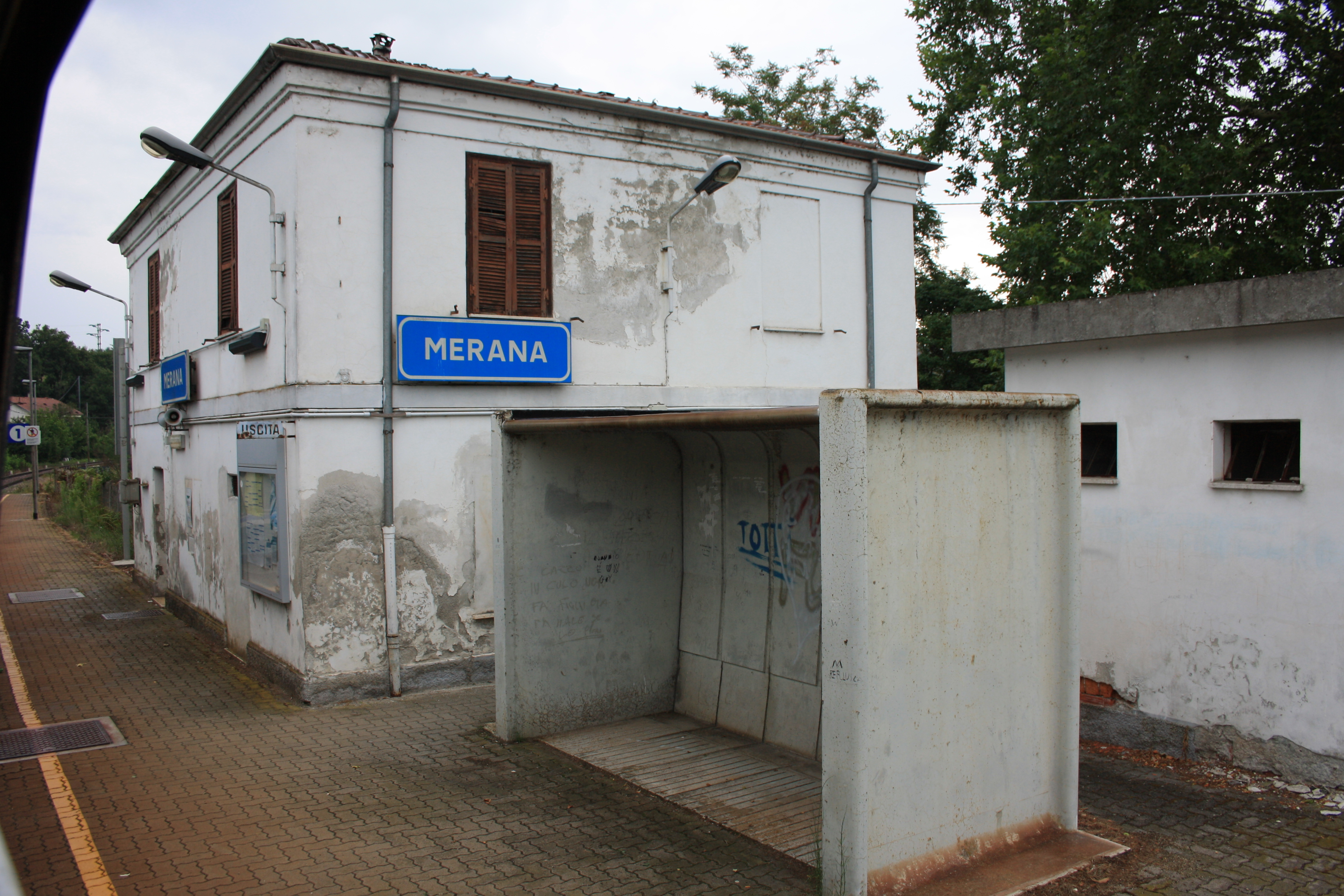 La fermata ferroviaria di Merana